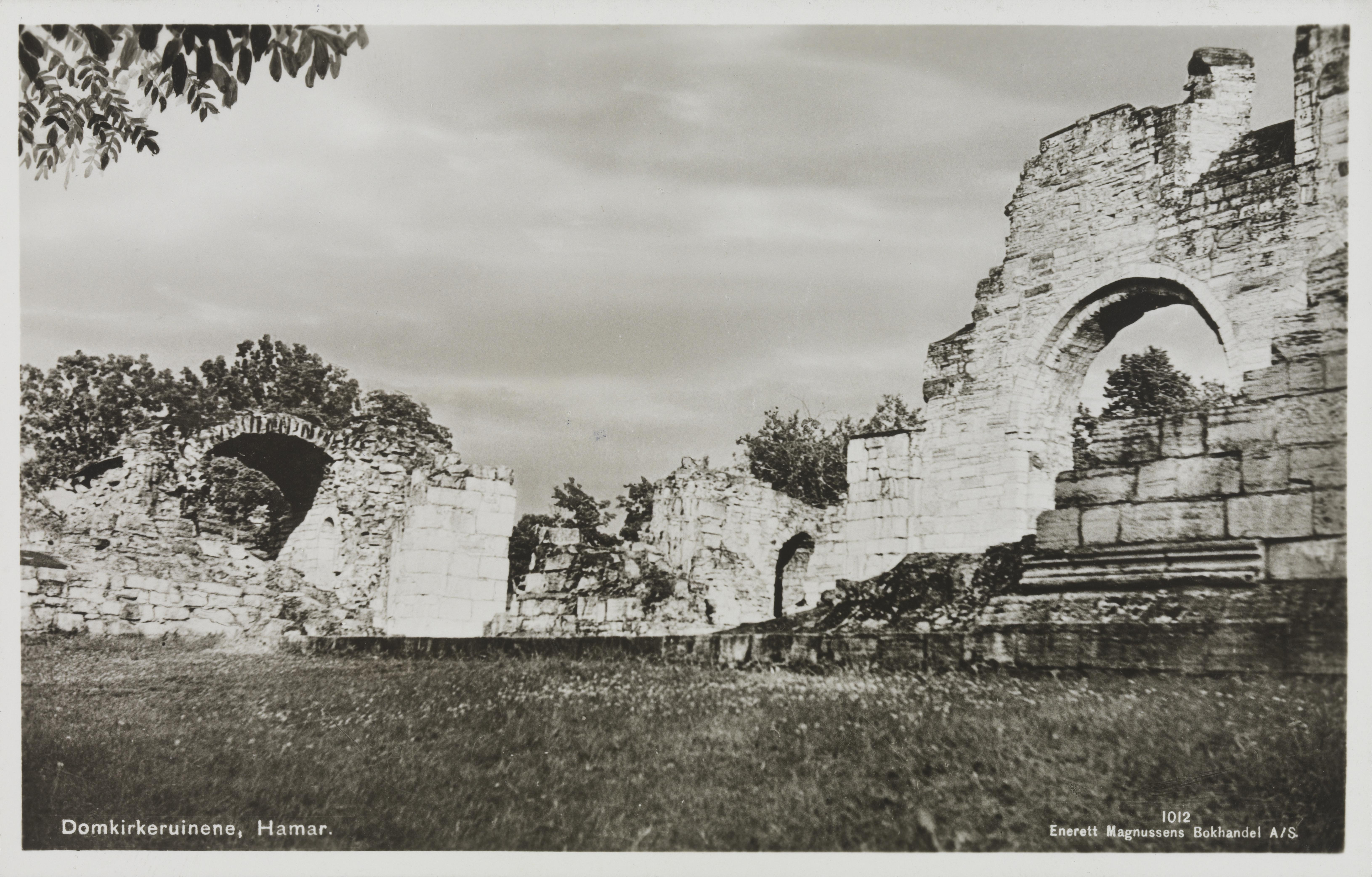 Bildet er hentet fra Nasjonalbibliotekets bildesamling Domkirkeodden, Hamar, Hedmark